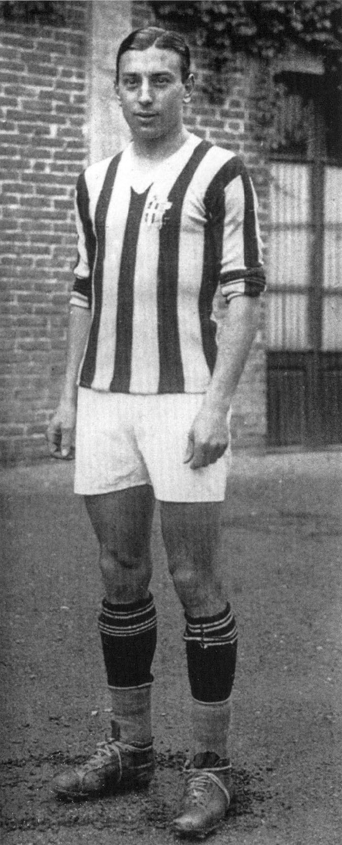 Il calciatore italo-argentino Raimundo Orsi alla Juventus nella prima metà degli anni 30 del XX secolo, fotografato all'esterno dello stadio di Corso Marsiglia (Campo Juventus) di Torino.